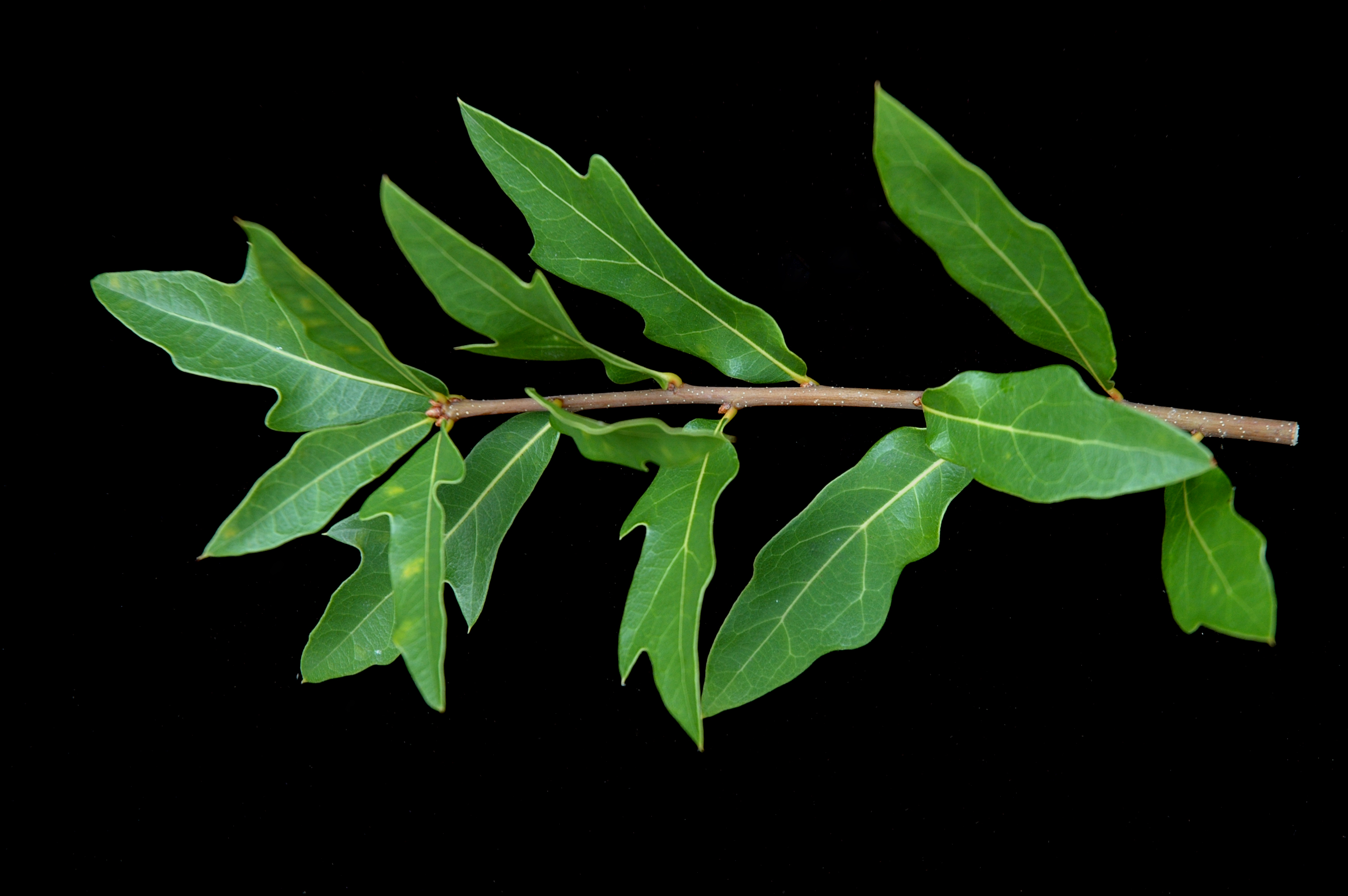 Quercus laurifolia